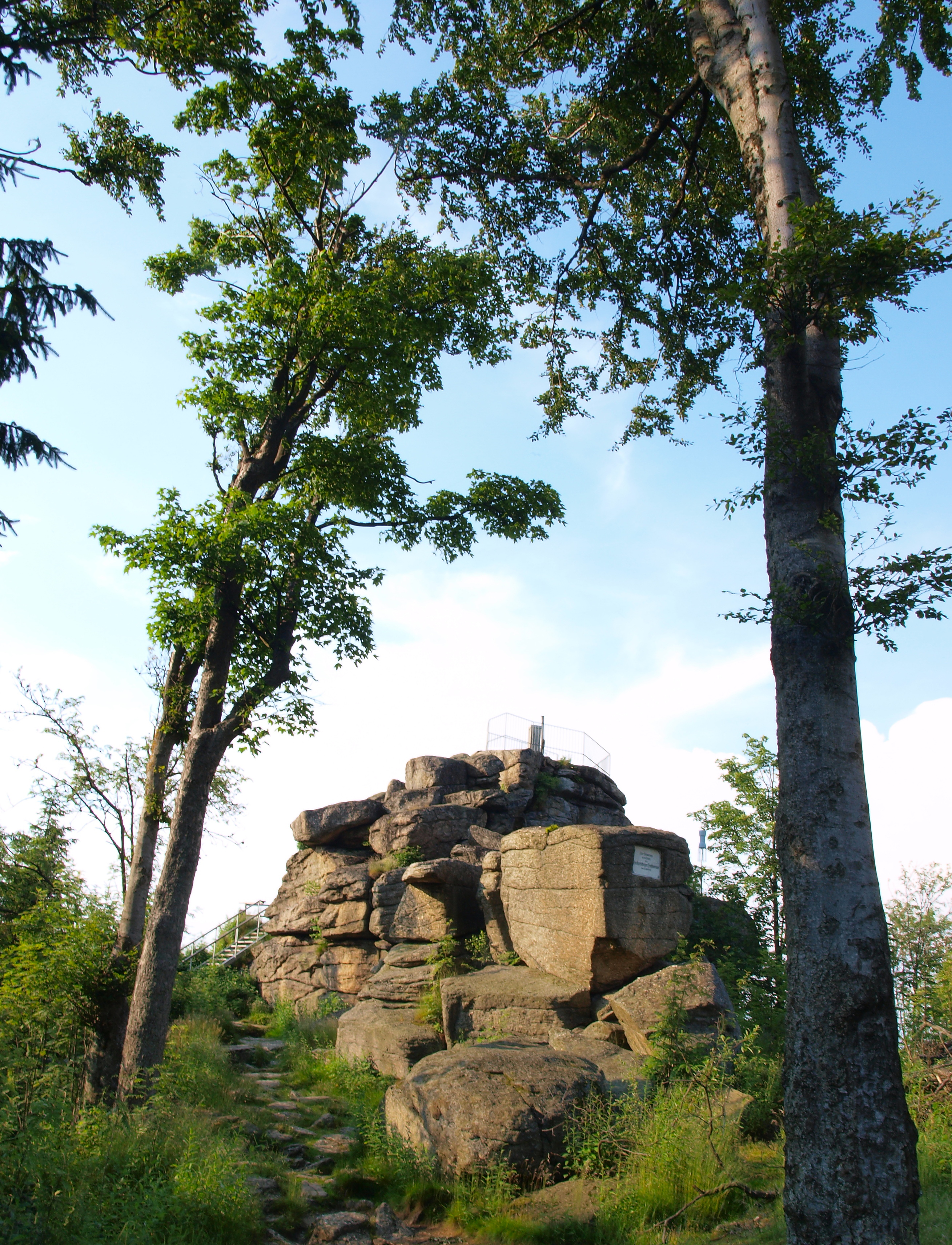 Skály vrcholu Nebelstein v Rakousku